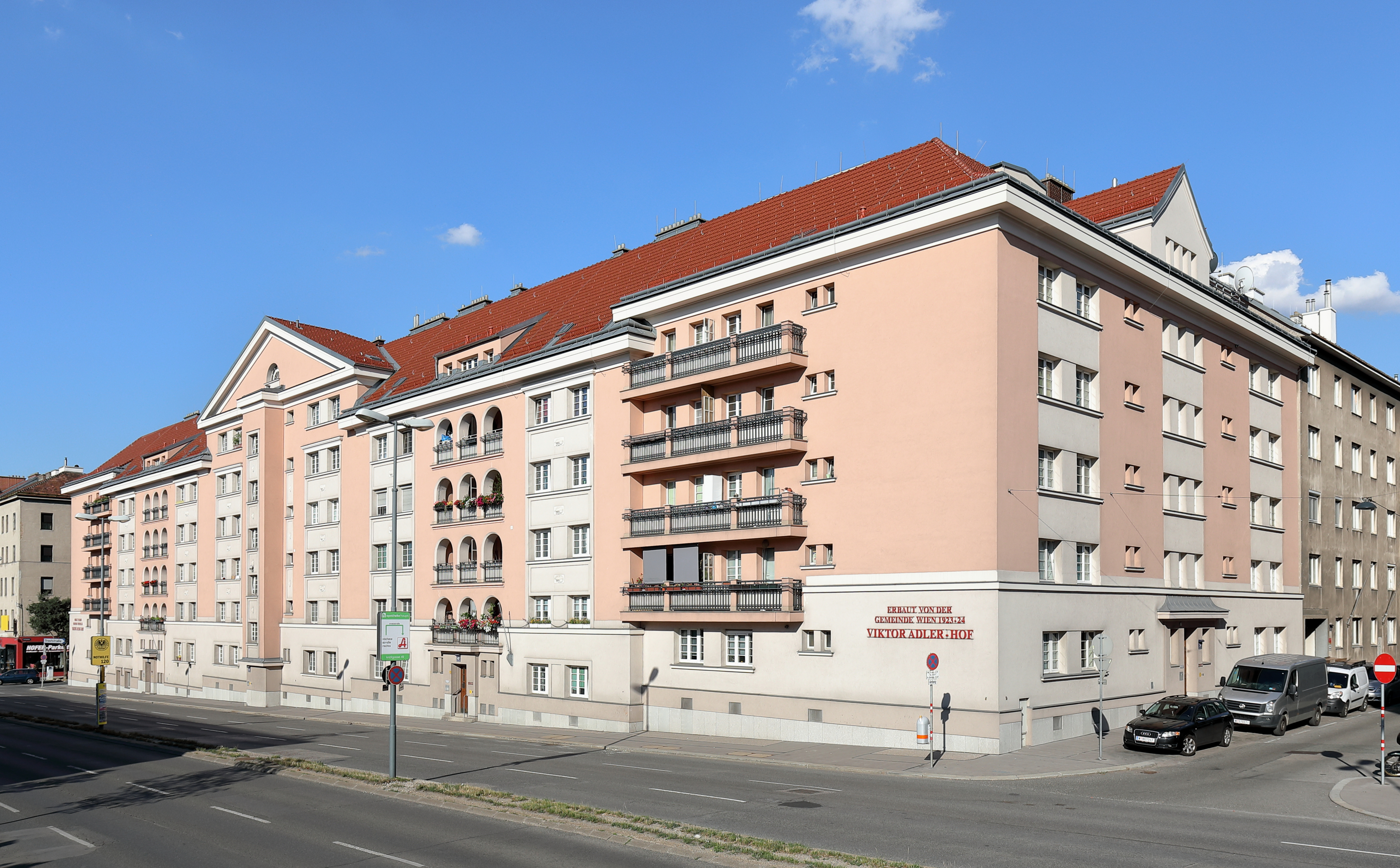 Die Wohnhausanlage „Viktor-Adler-Hof“ der Gemeinde Wien an der Adresse Triester Straße 57-65 und Quaringasse 24 sowie Troststraße 127 im 10. Wiener Bezirk Favoriten. Der nach dem SPÖ-Politiker Victor Adler, der als Begründer der Sozialdemokratischen Partei Österreichs gilt, benannte Gemeindebau mit 110 Wohneinheiten wurde von 1923 bis 1924 nach Plänen des Architekten Engelbert Mang errichtet. This media shows the Vienna residential building (Gemeindebau) with the ID 117.